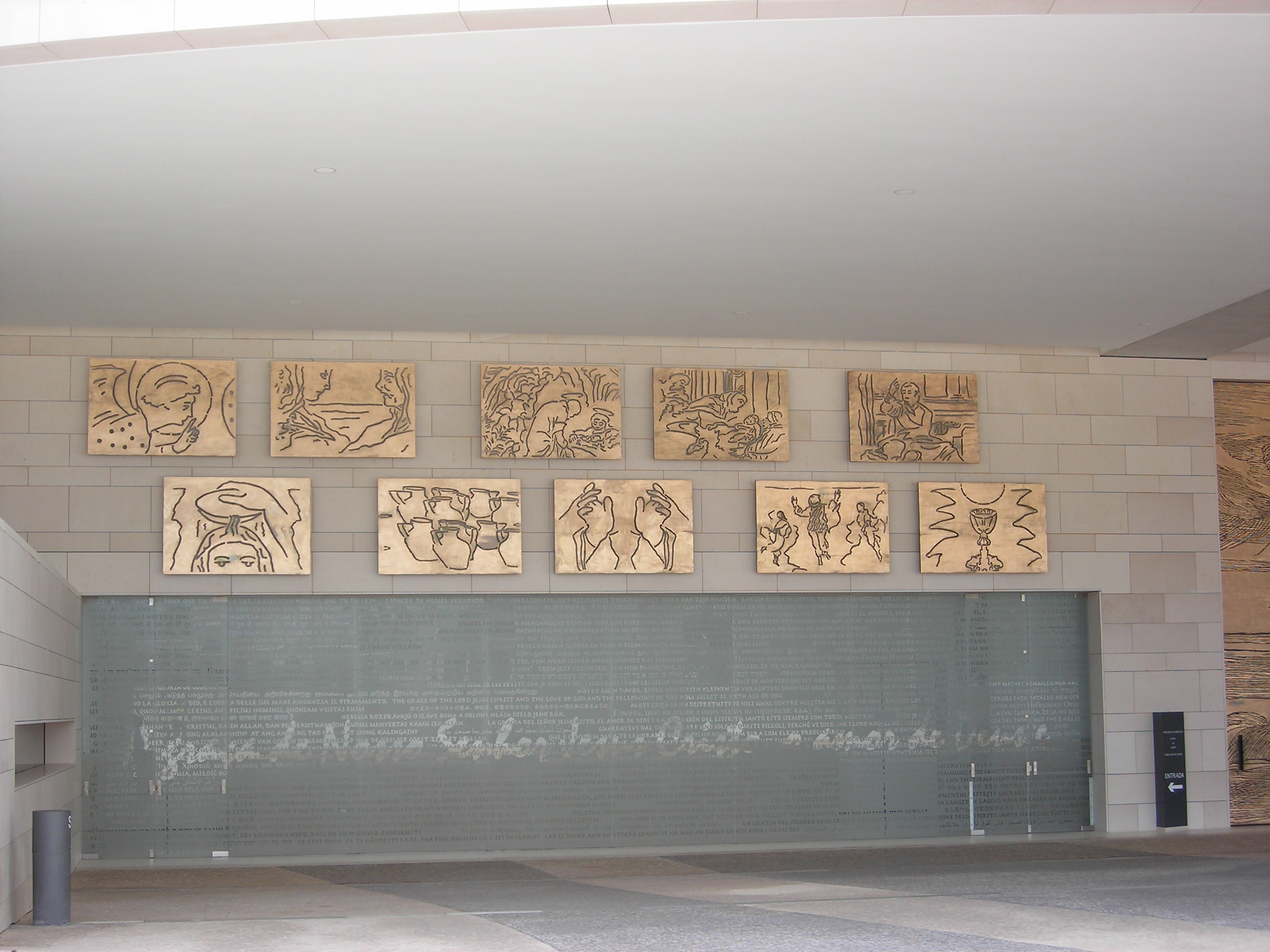 Santuário de Fátima